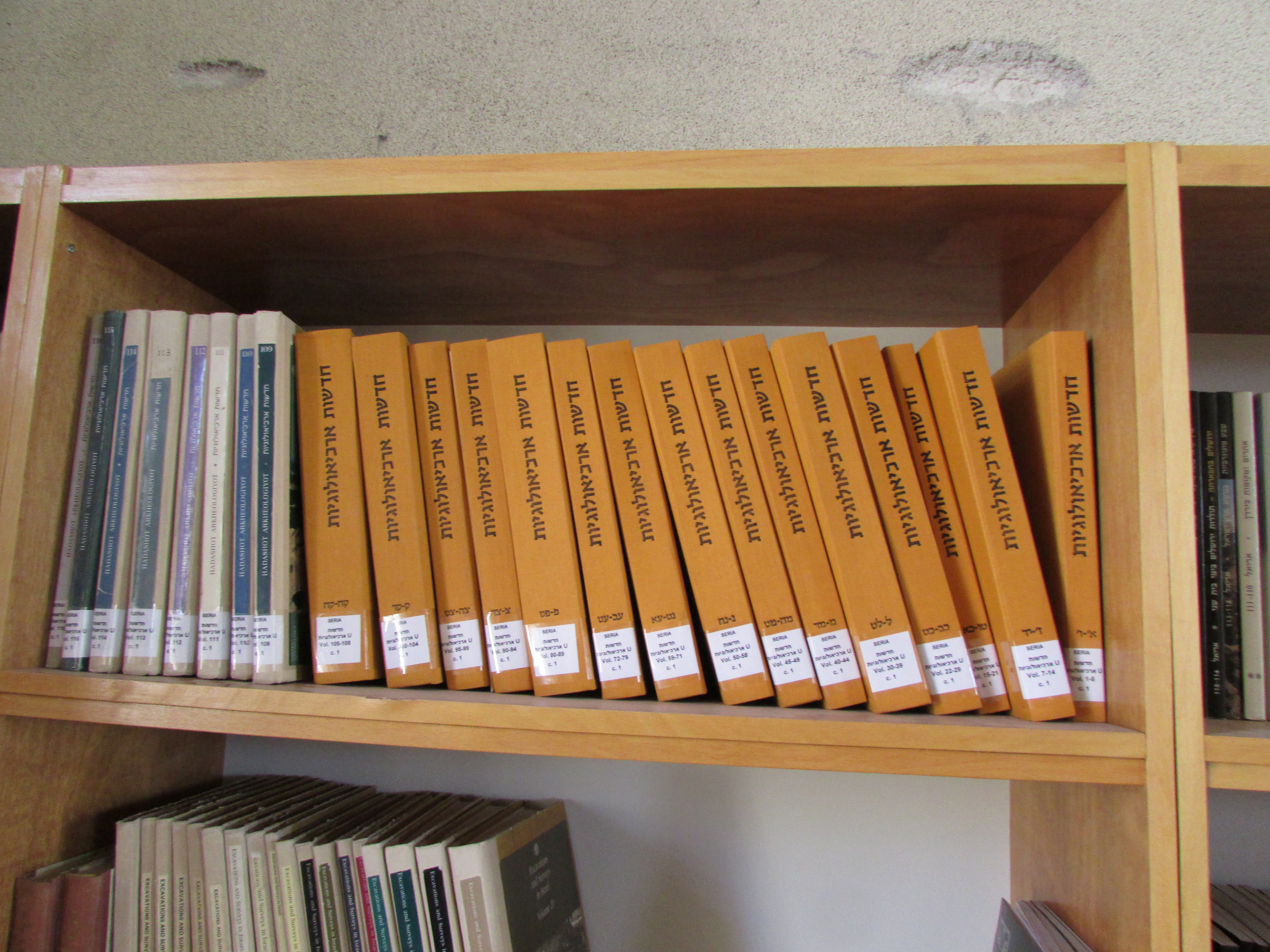 Rockefeller Museum library